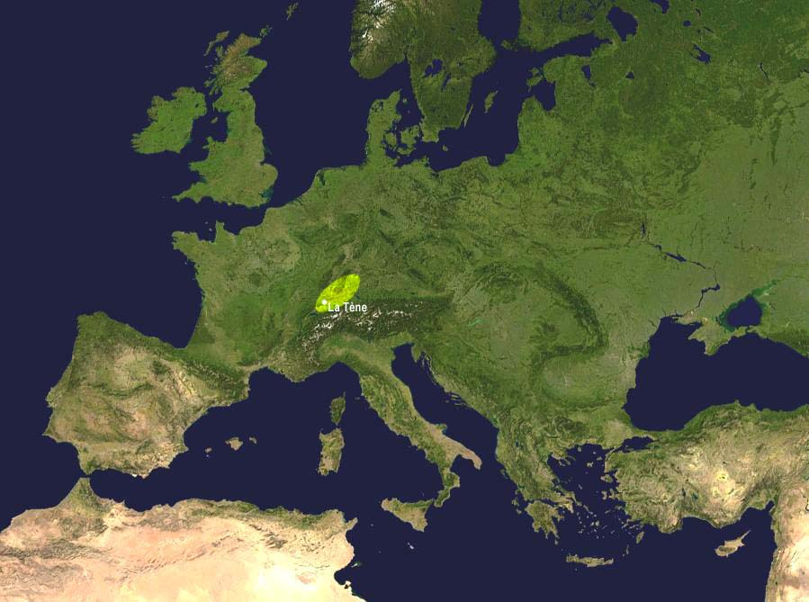 La Tène Culture area, V centuty BC